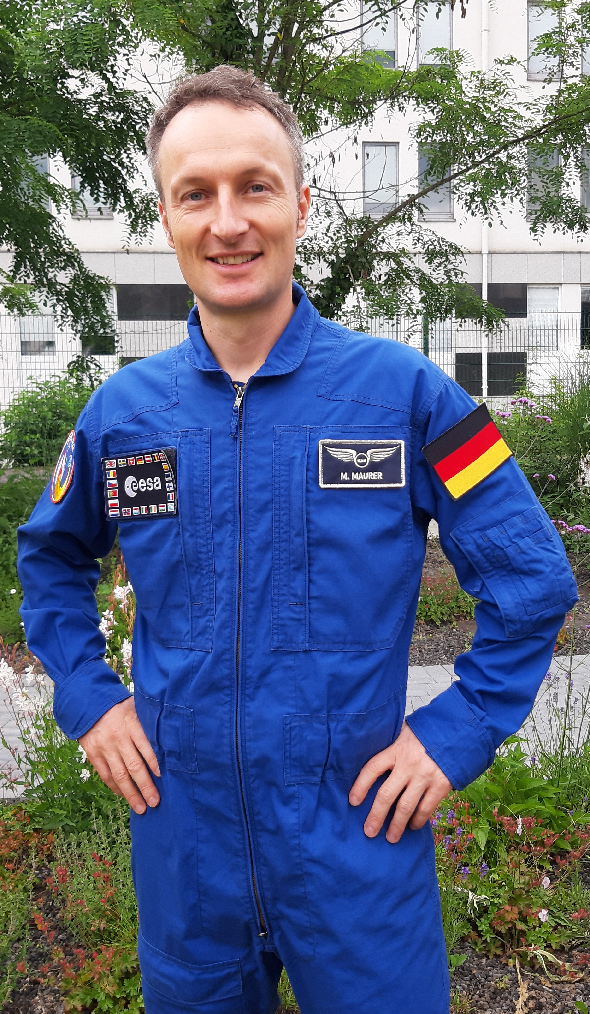 Matthias Maurer, ESA astronaut